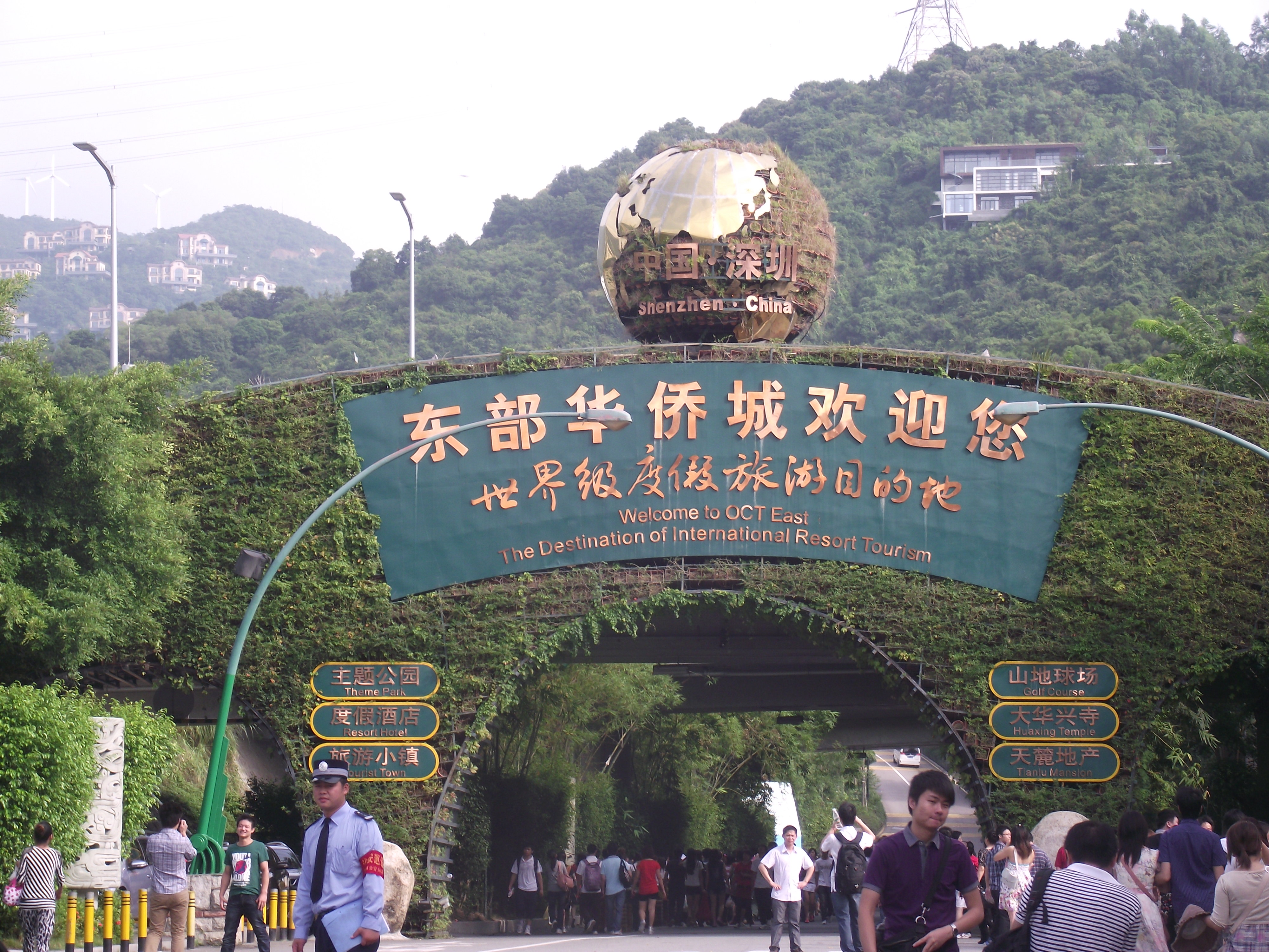 中文（中国大陆）: 东部华侨城